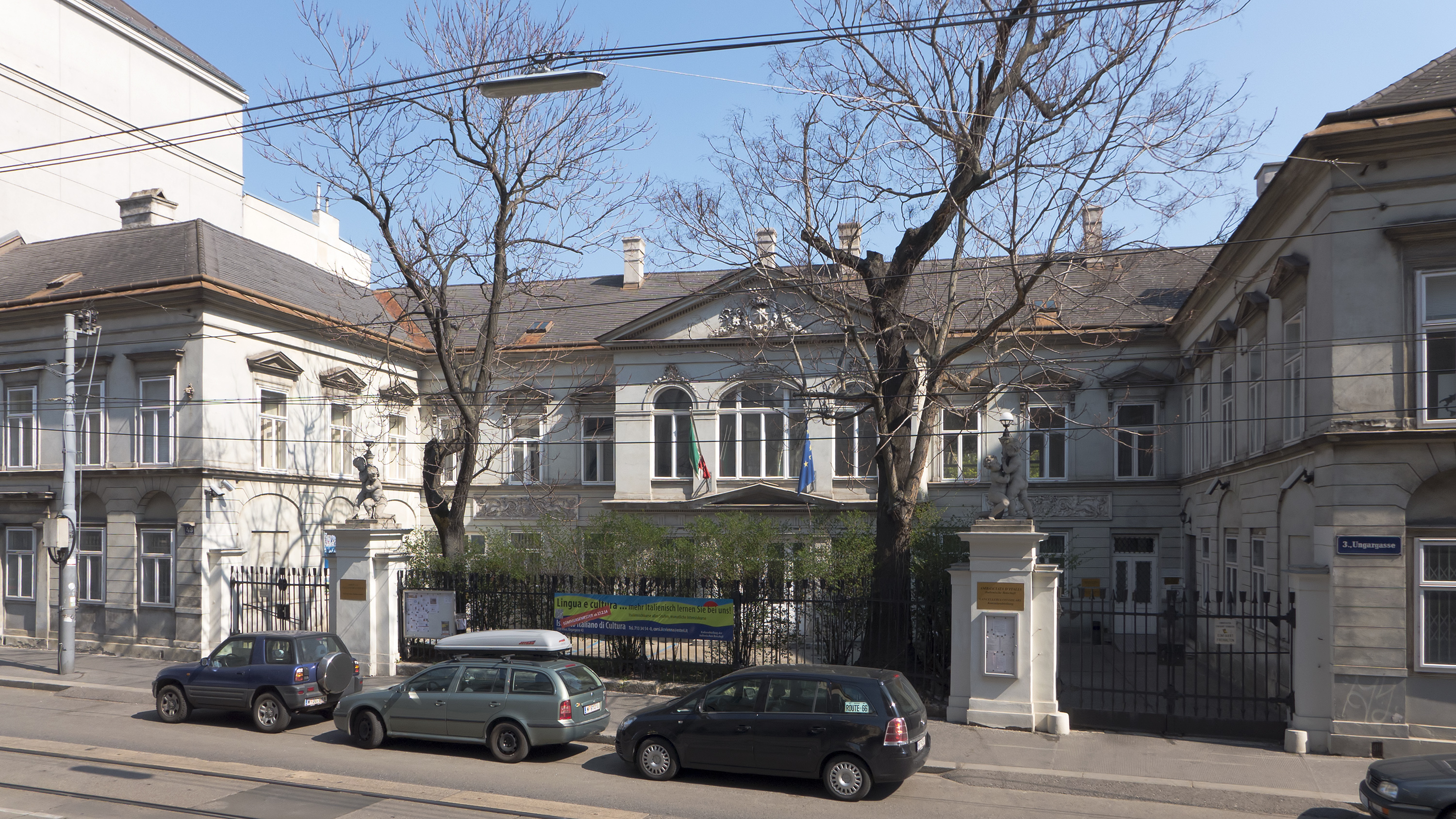 Palais Sternberg in der Ungargasse 43 in Wien 3